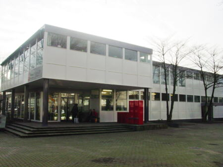 Schoolgebouw COV Prisma College Amersfoort (NL) Bron;eigen werk Date;16-02-2007 Author;L.J.Traas